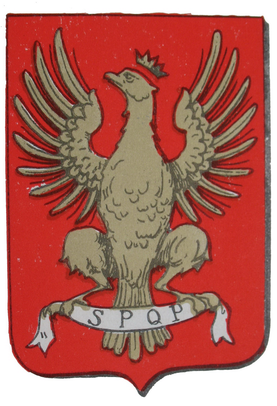 Stemma della città di Palermo, dalla tavola 82 de Il blasone in Sicilia, (1871-75).